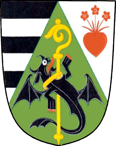 znak obce Únanov